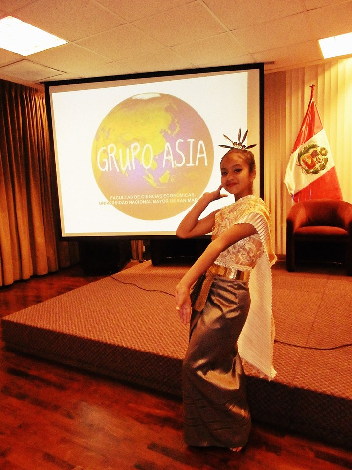 Evento Grupo Asia (1)